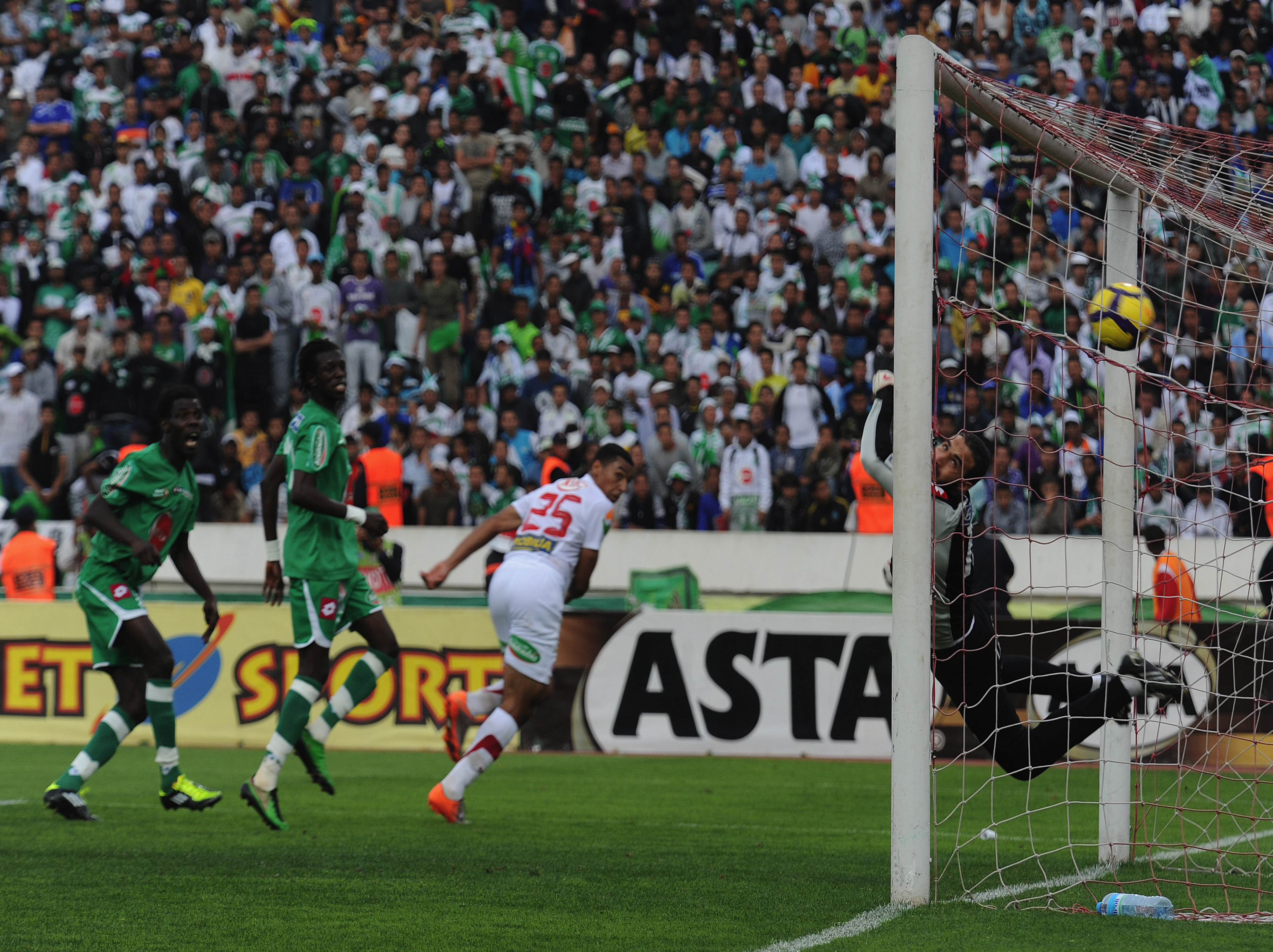 RCA vs WAC